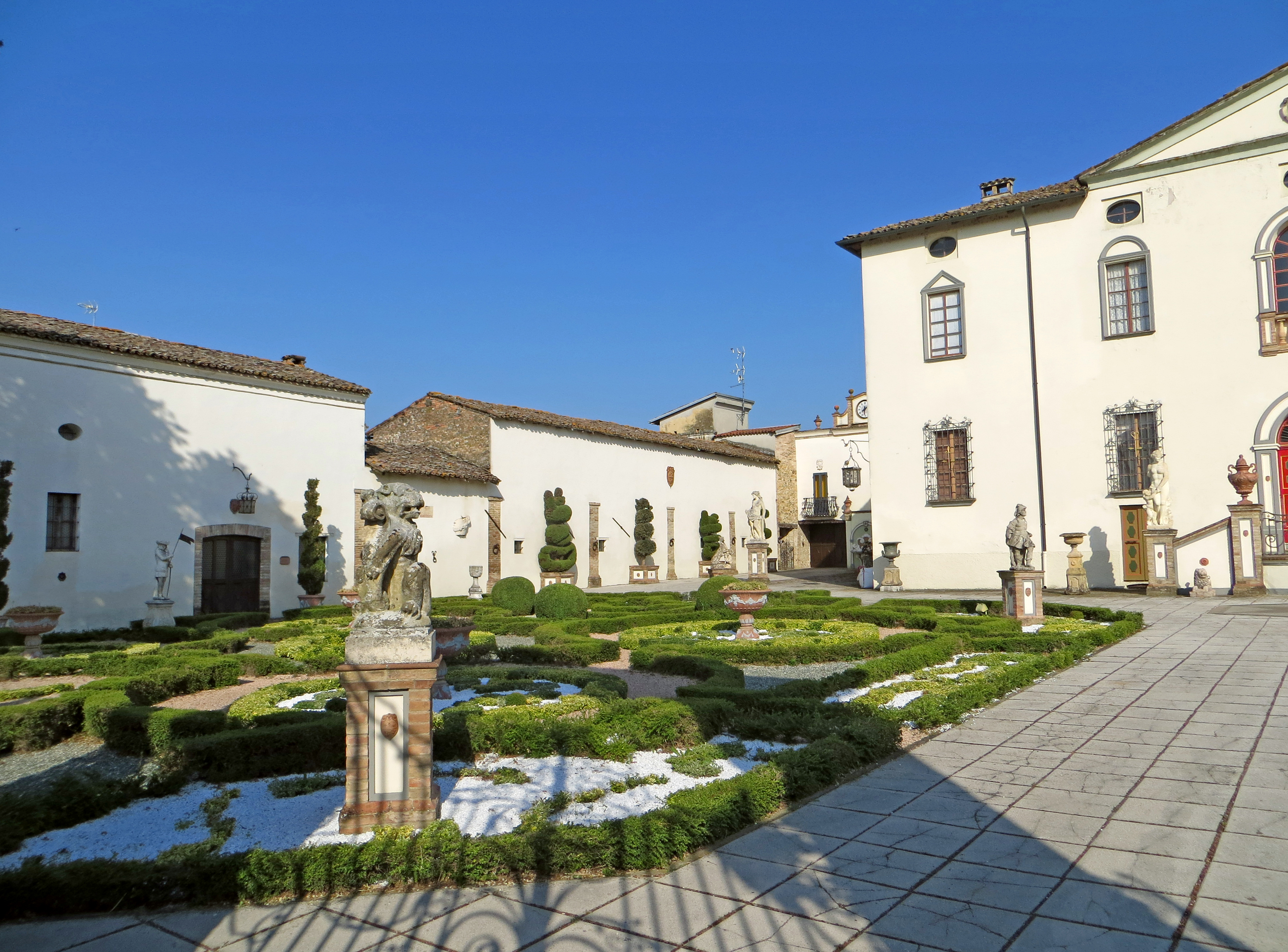 Villa Lanfranchi (Santa Maria del Piano, Lesignano de' Bagni) - lato nord del giardino